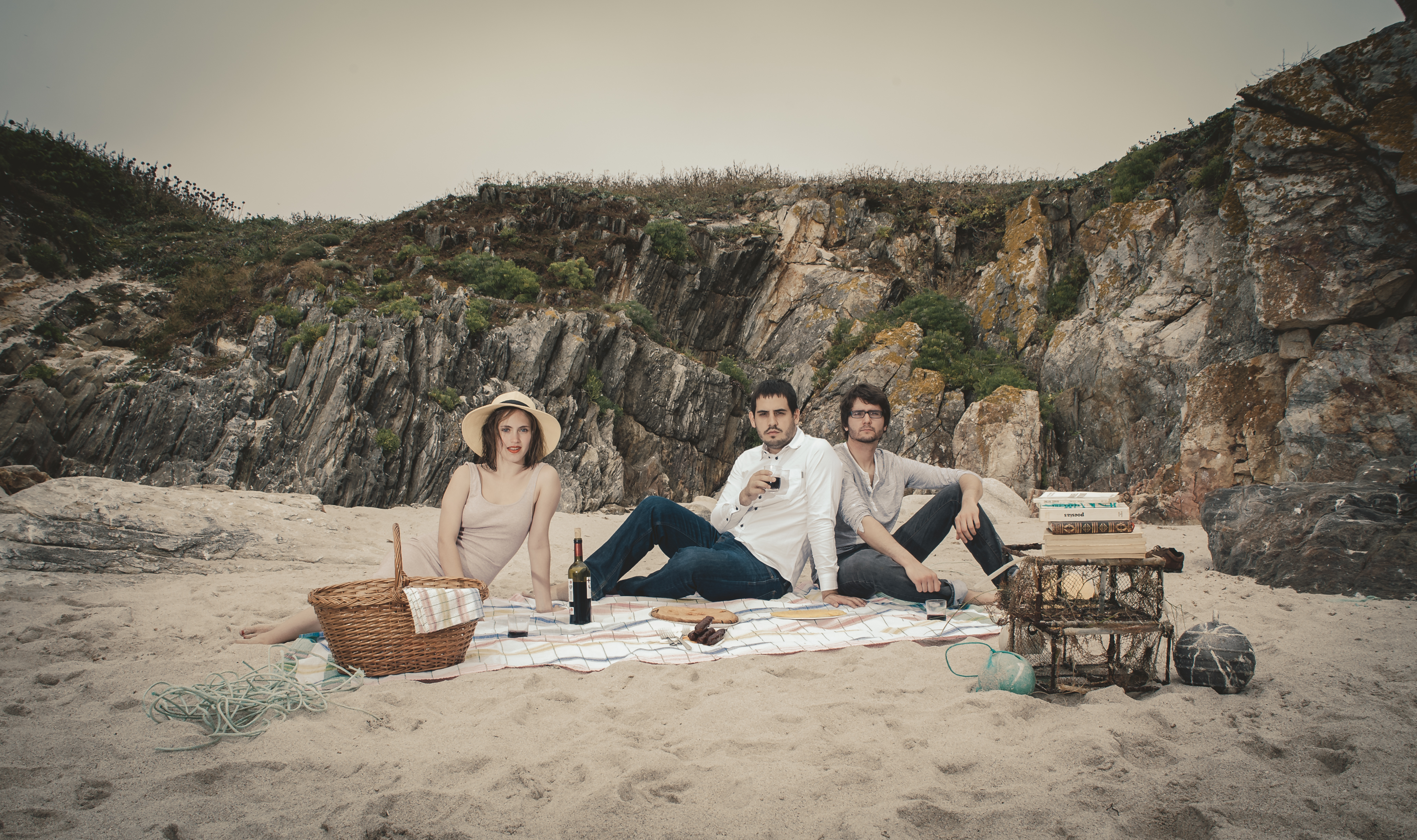 Gelria nunha foto promocional nas Illas Sisargas. Foto: Juan Luis Rúa